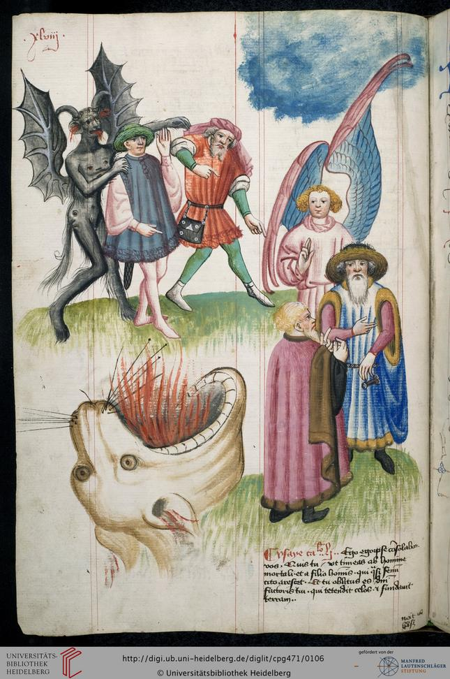 Hugo von Trimberg "Der Renner"